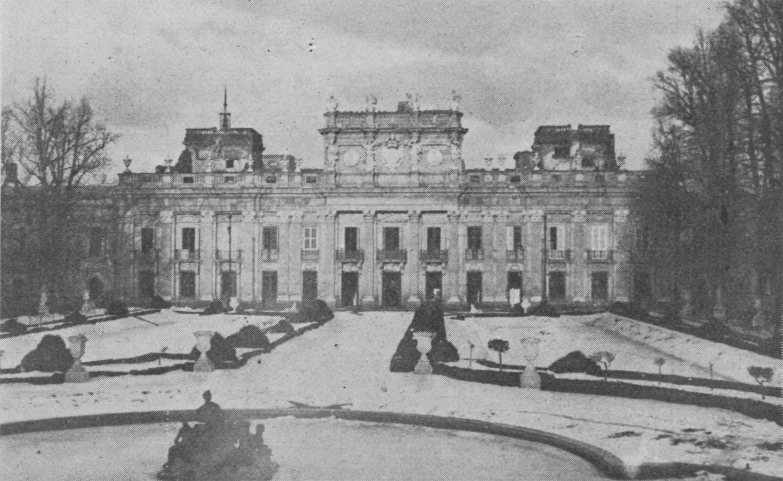 Scan of L'ILLUSTRATION No 3906 12 Janvier 1918. Le palais royal de la Granja presque entièrement Détruit par un incendie.